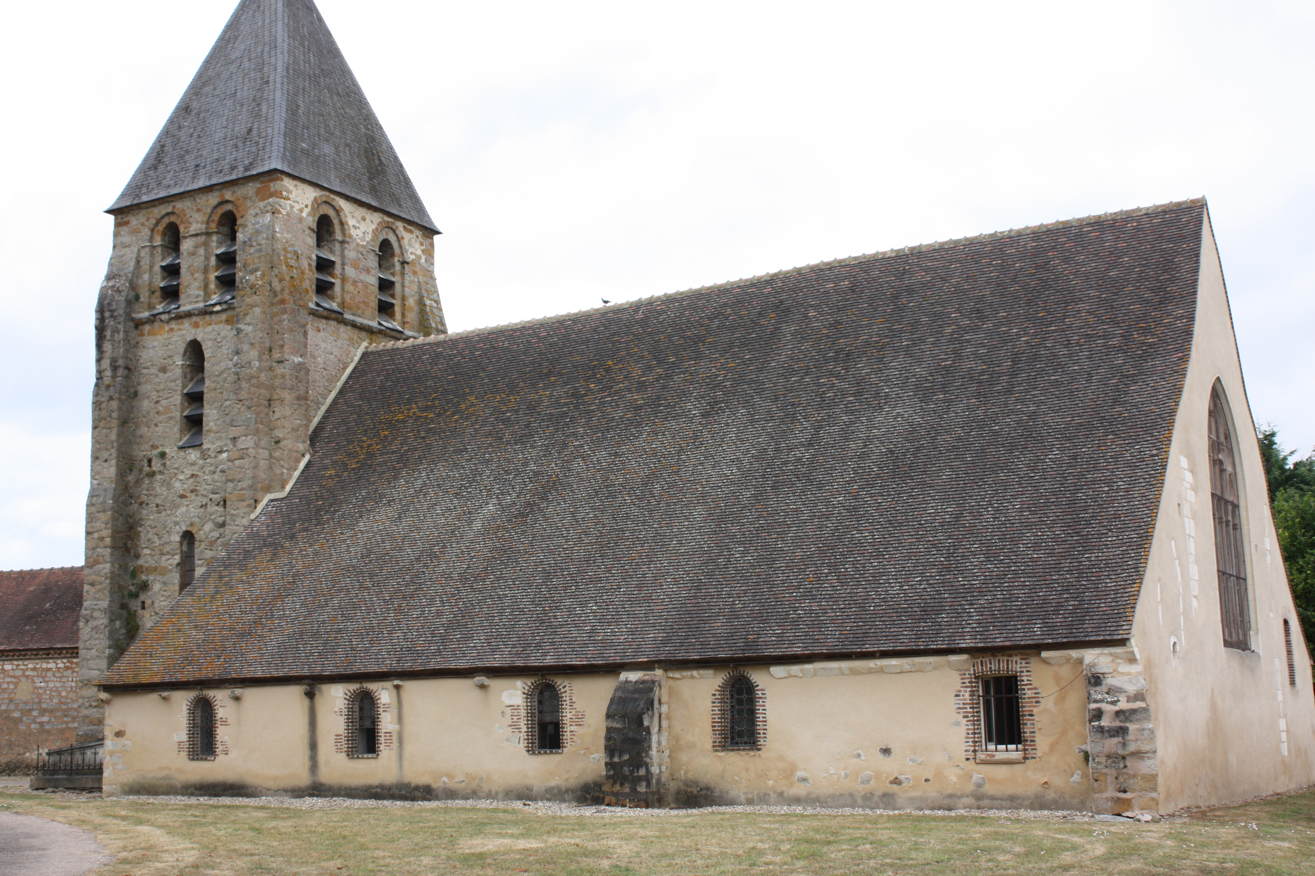 Eglise de Lailly (Yonne)